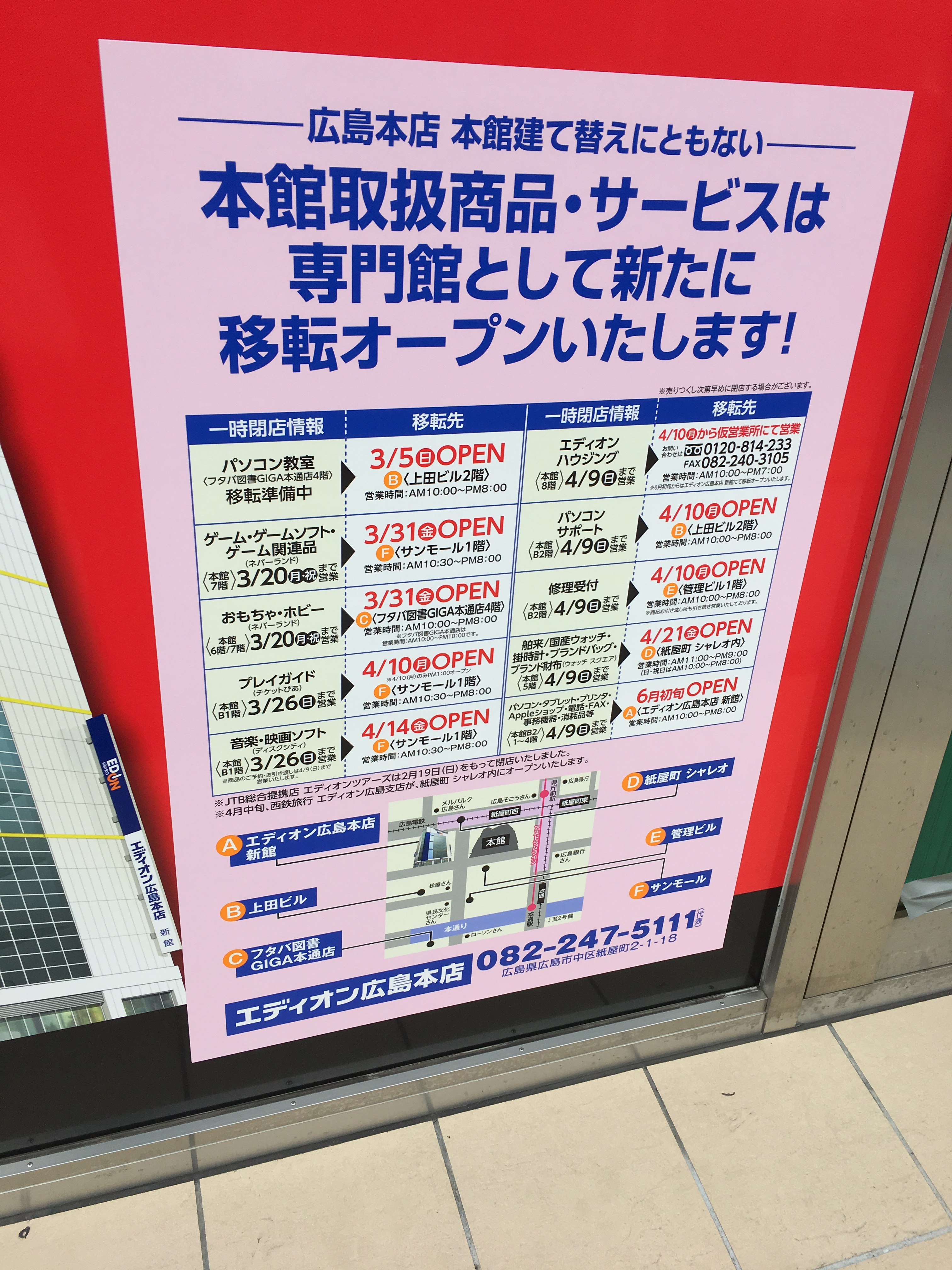 エディオン広島本店の建て替えに伴う一時閉店を知らせる案内